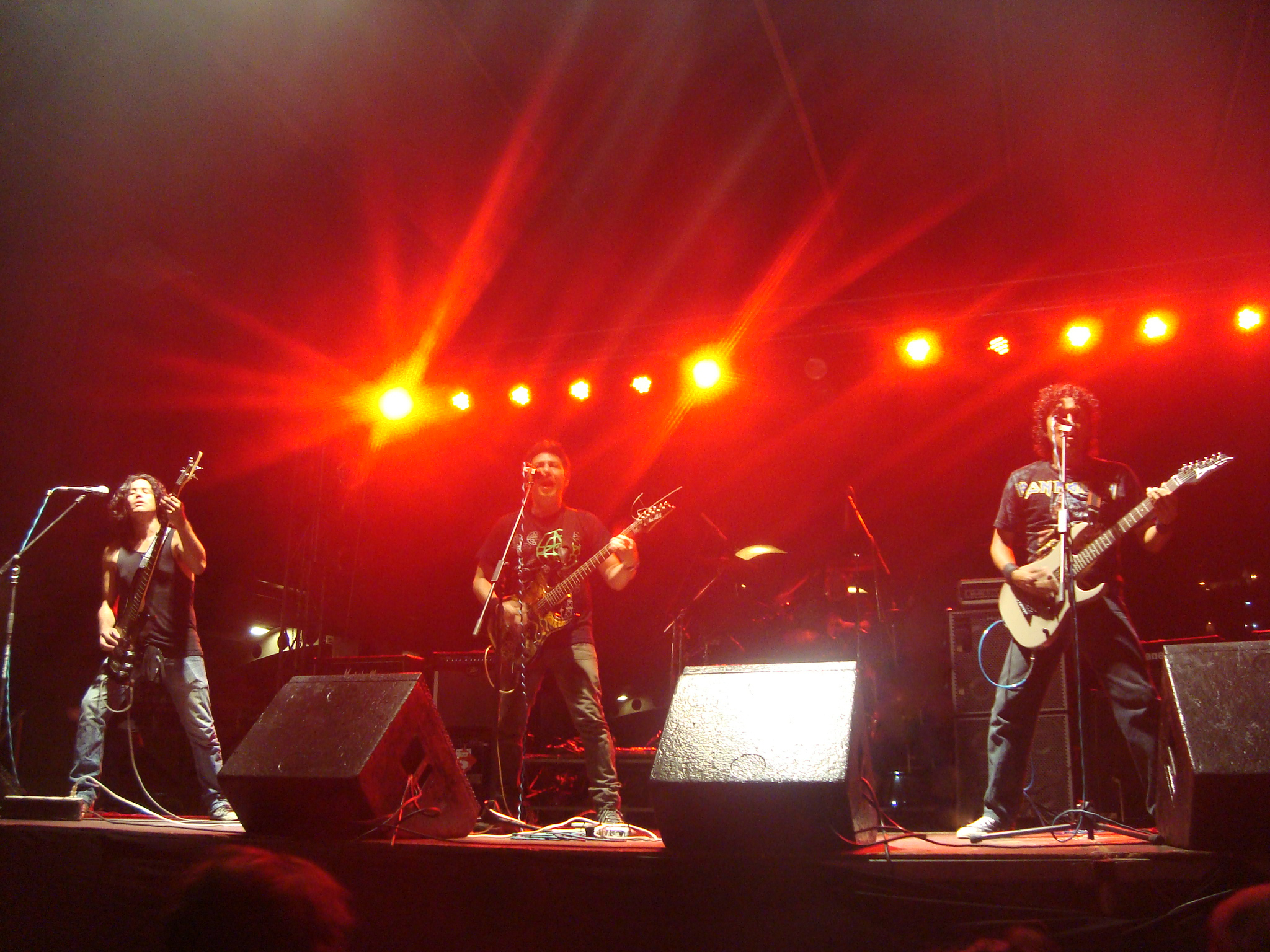 Profecía en vivo en el Festival Unidos Por el Rock en Guayaquil.